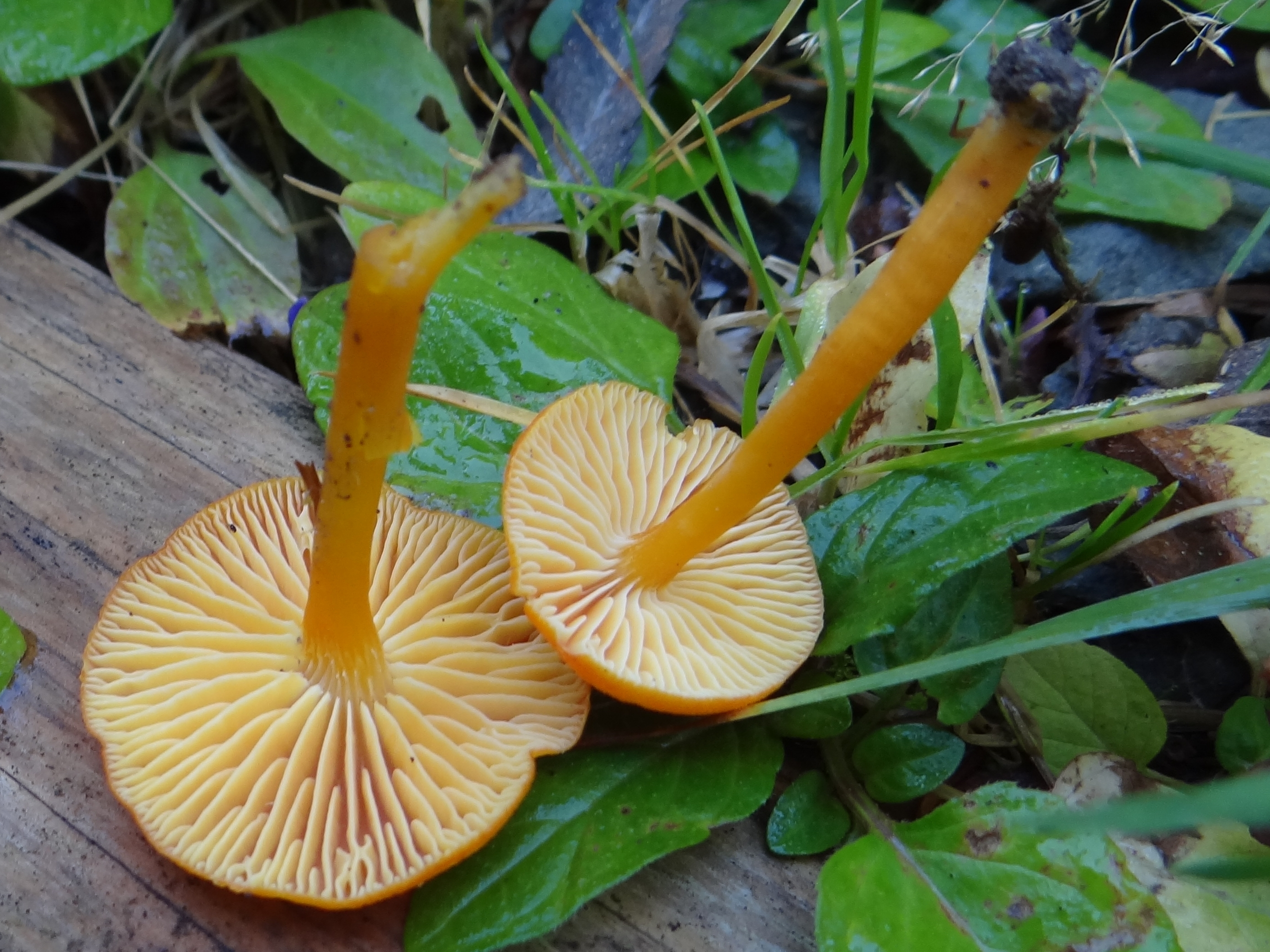 Hygrocybe miniata (location: Poland, Gorce, dolina Markowego Potoku)